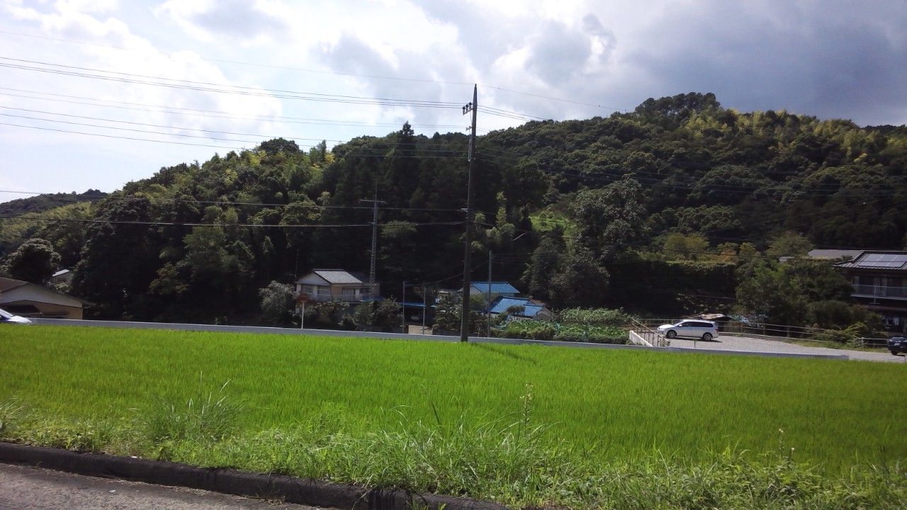 静岡県田方郡函南町にある田中城全景